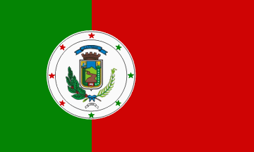 Bandera oficial del cantón de La Unión, Cartago, Costa Rica